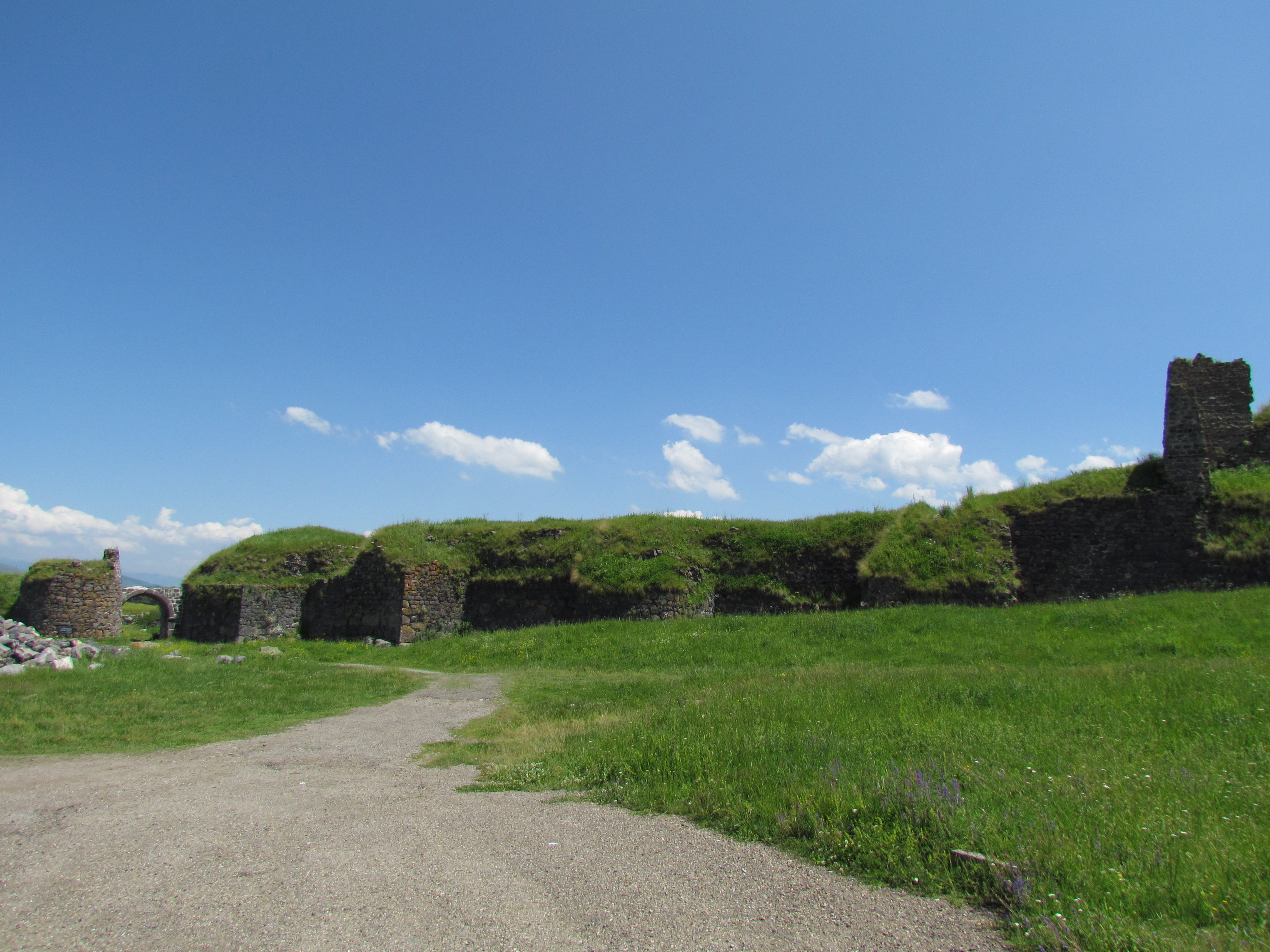 Lori Berd Lori Marz 44